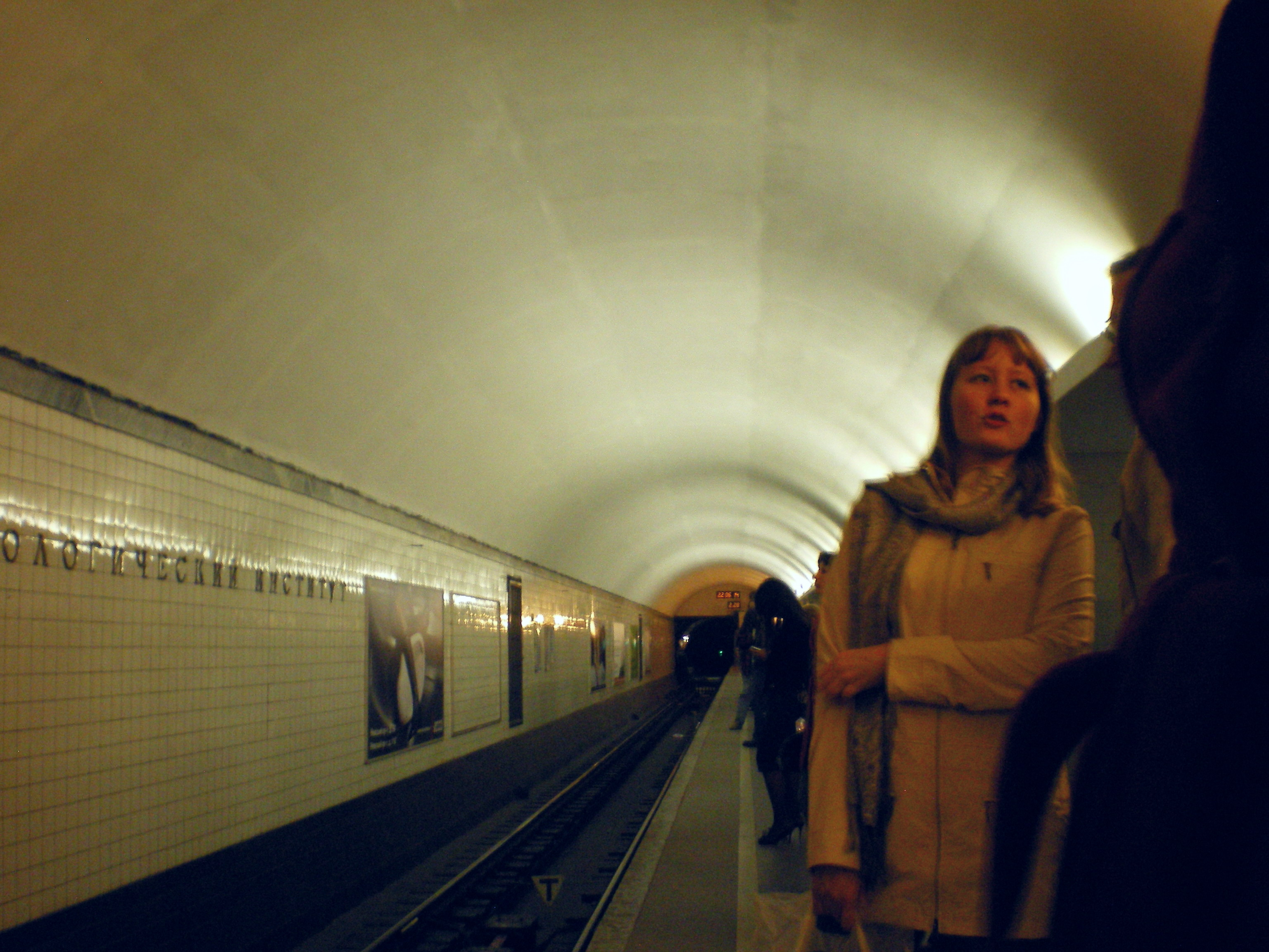 Cтанция «Технологический институт - 2», перрон Кировско-Выборгской линии.